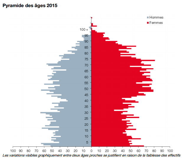 Возрастная пирамида монегасков 31 декабря 2015 год